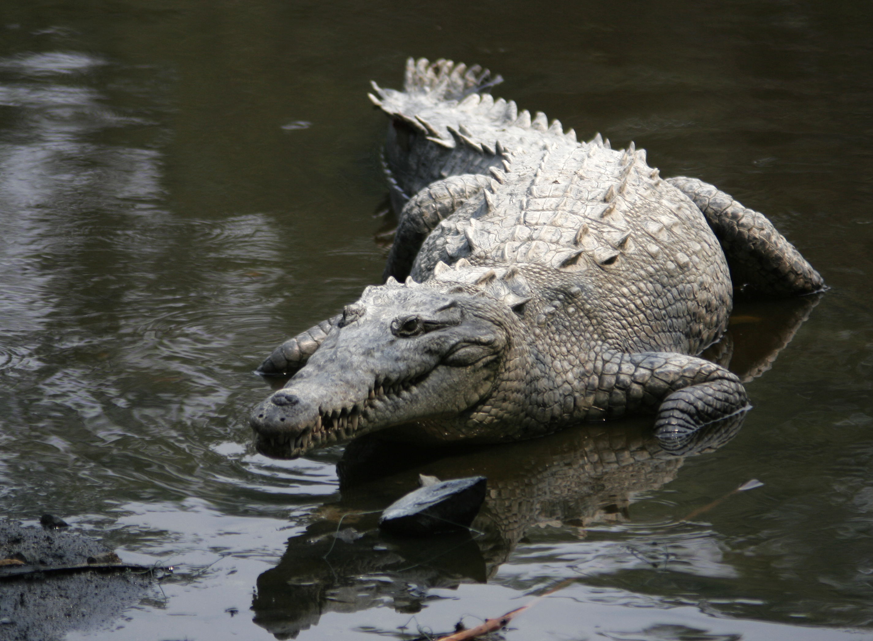 Crocodylus acutus, American Crocodile, Cocodrilo Americano. Photo taken at La Manzanilla, Jalisco, Mexico